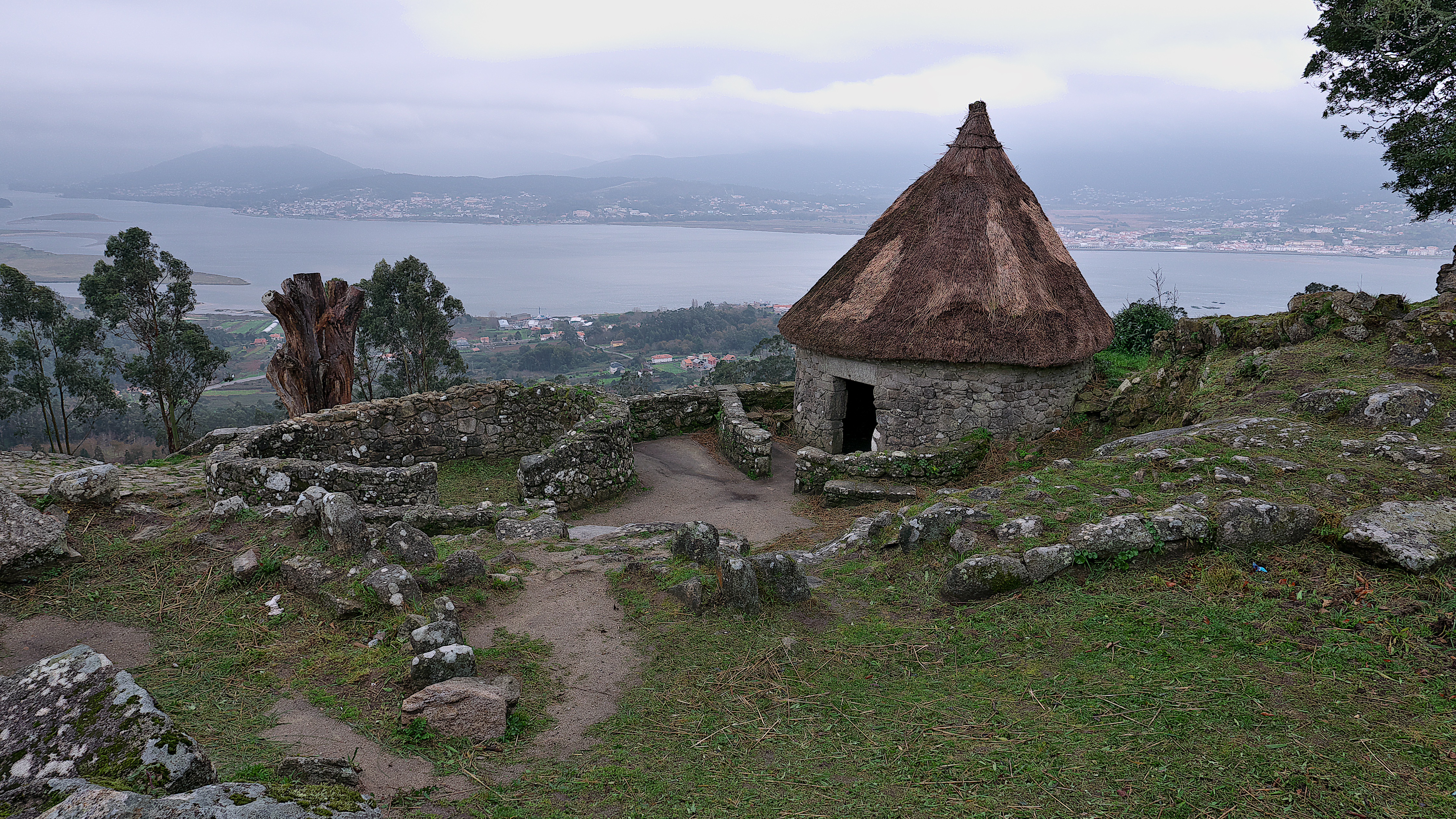 Reconstrucción de una cabaña del poblado.